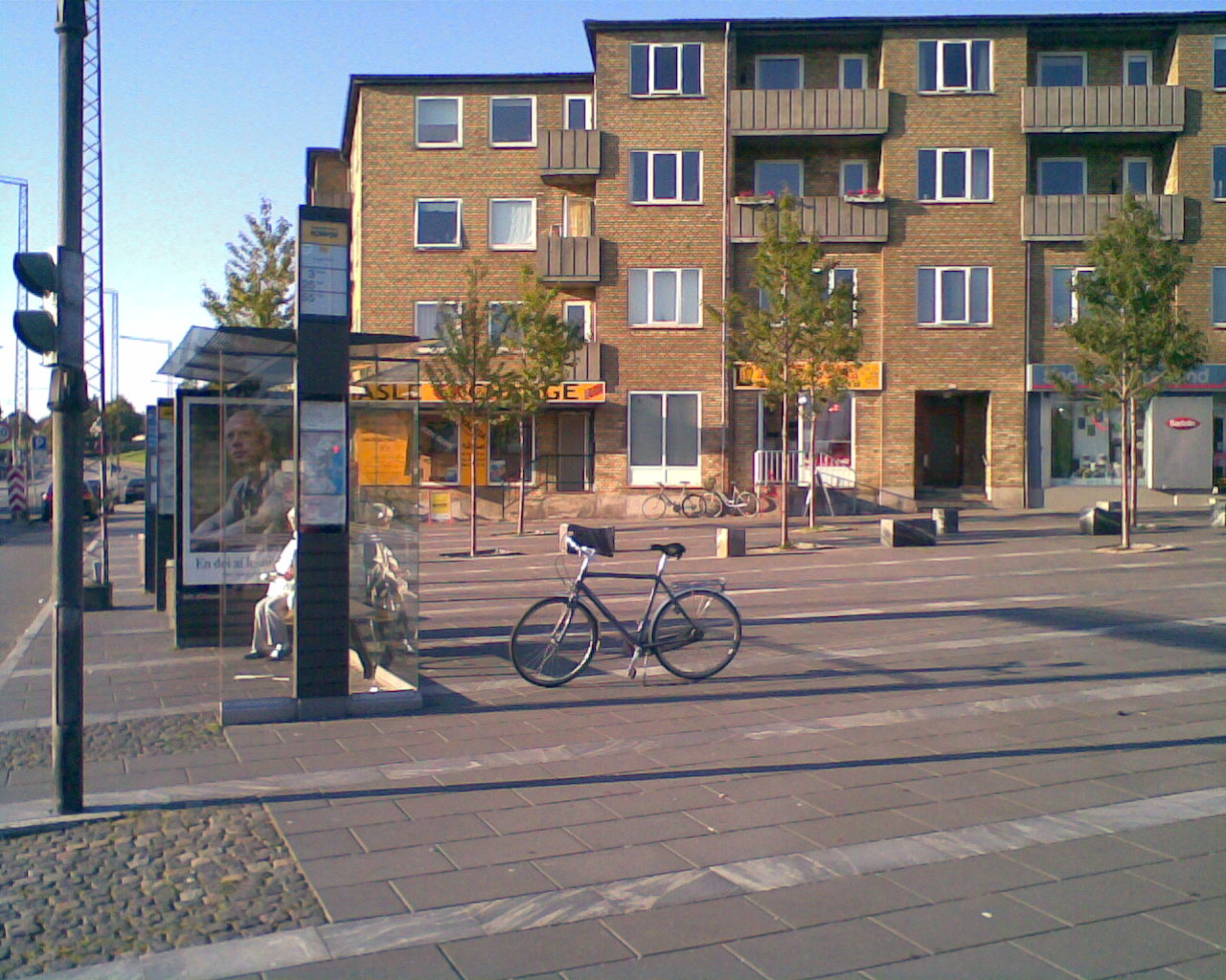 Hasle Torv, Århus, Danmark